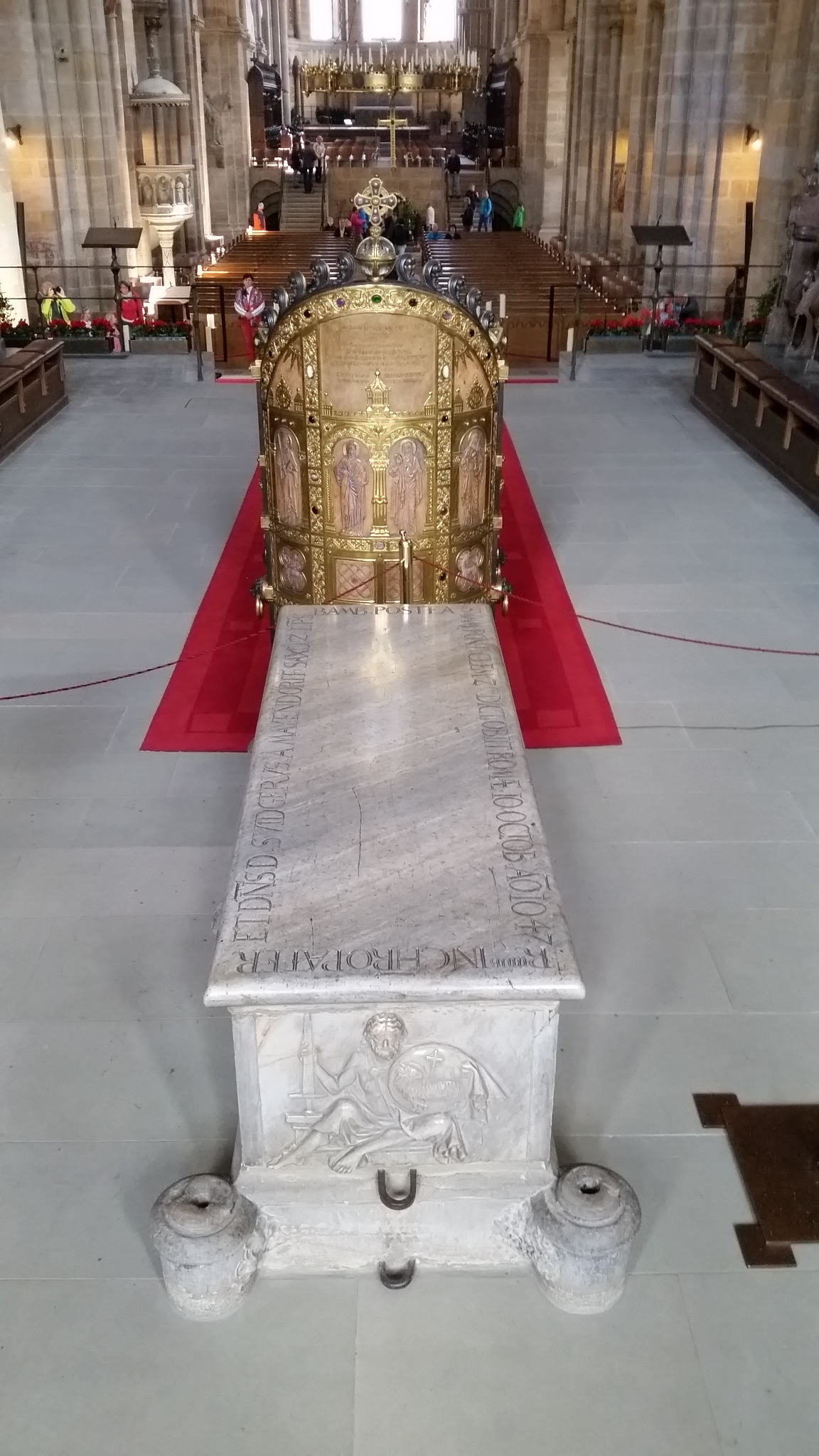 Grave Clemens II. in Bamberg